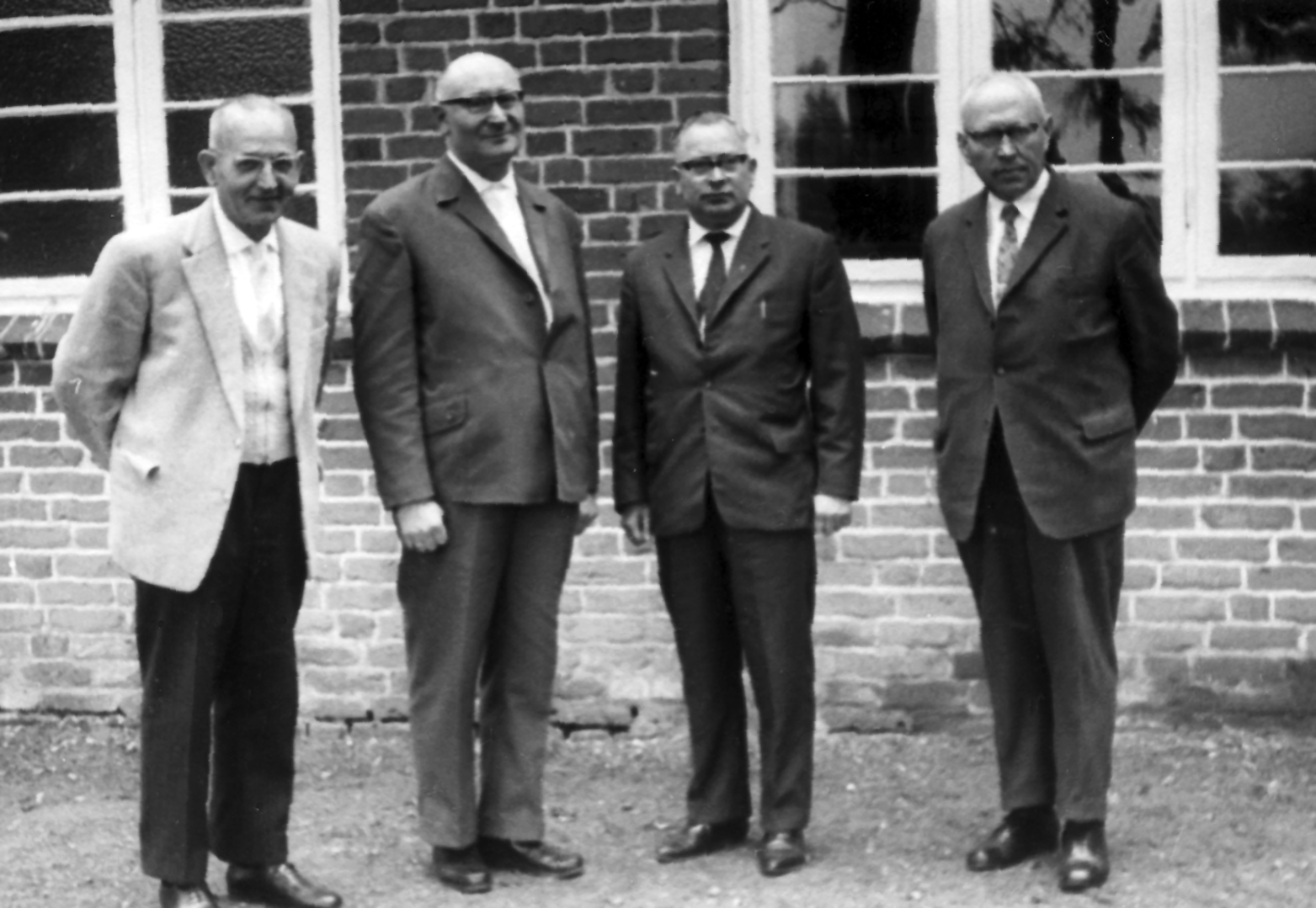 Die Inititiatoren des Gnadauer Posaunenbundes nach dem 2. Weltkrieg am 24.5.1963 (v.l.)Gerhard Borchers, Walter Mackscheidt, Hermann Mink Friedrich Haase im Waldheim am Brahmsee